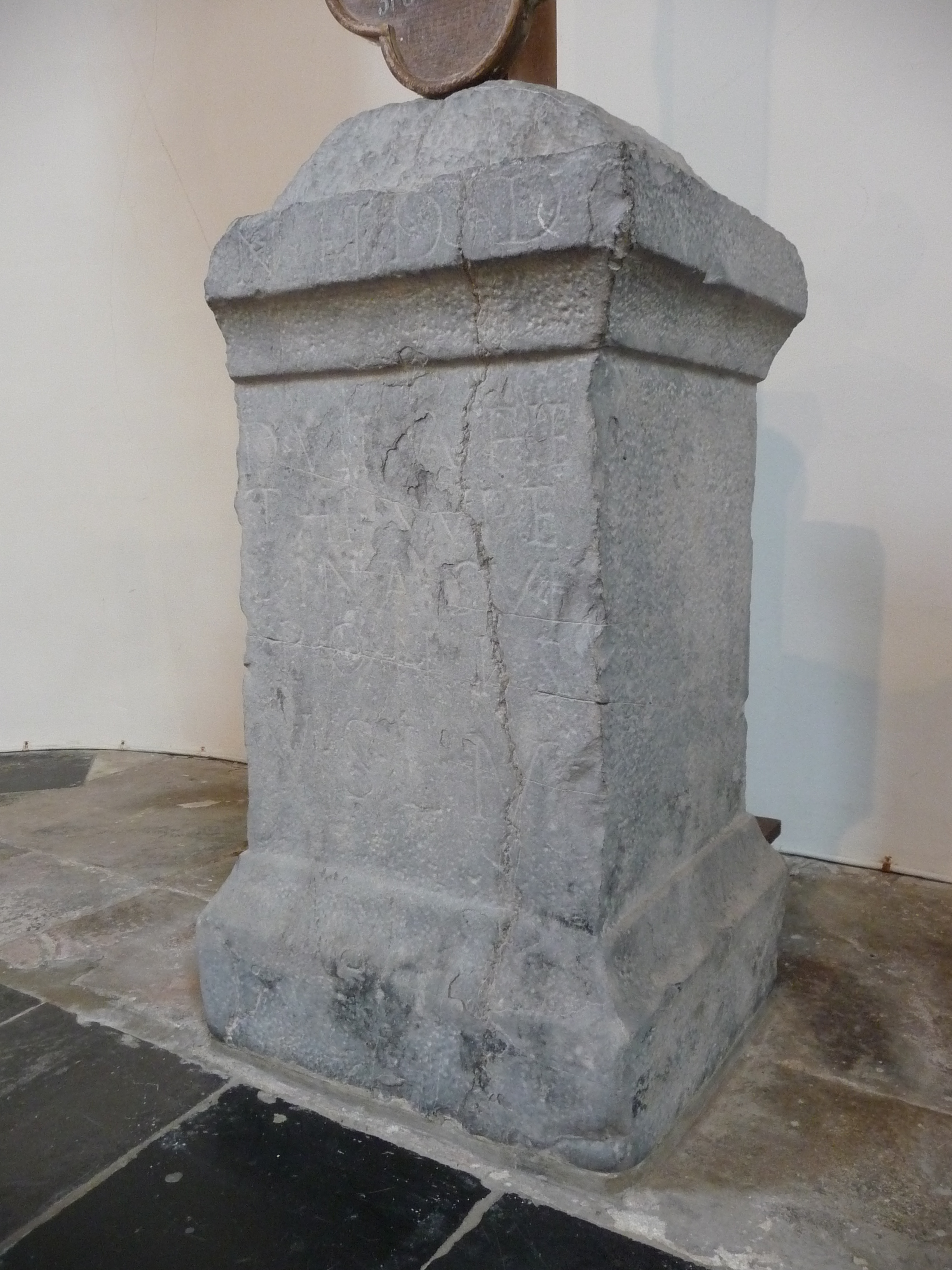 Strée-lez-Huy, Commune de Modave, Belgique. Église Saint-Nicolas (XIIe siècle). Ex-voto gallo-romain dédié à la Déesse Virathethi